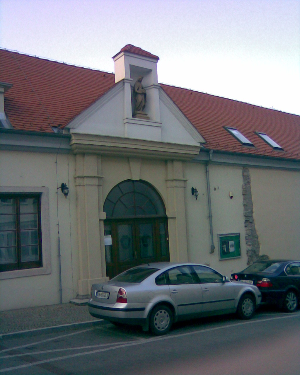 Palfiho palác na Zámockej ulici v Bratislave